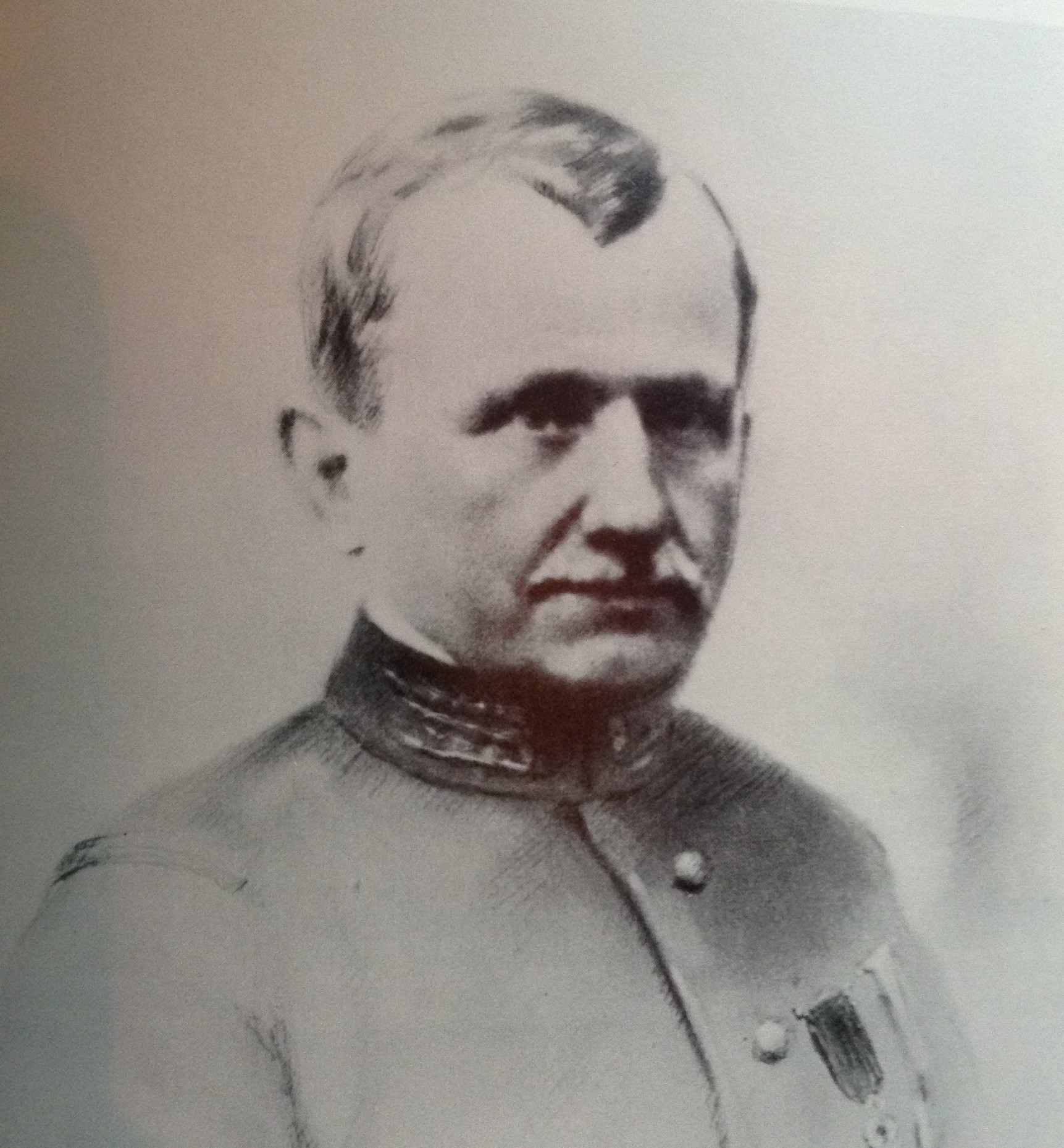 Albert Clarac, premier directeur de l'Ecole du Pharo, médecin inspecteur général des troues coloniales